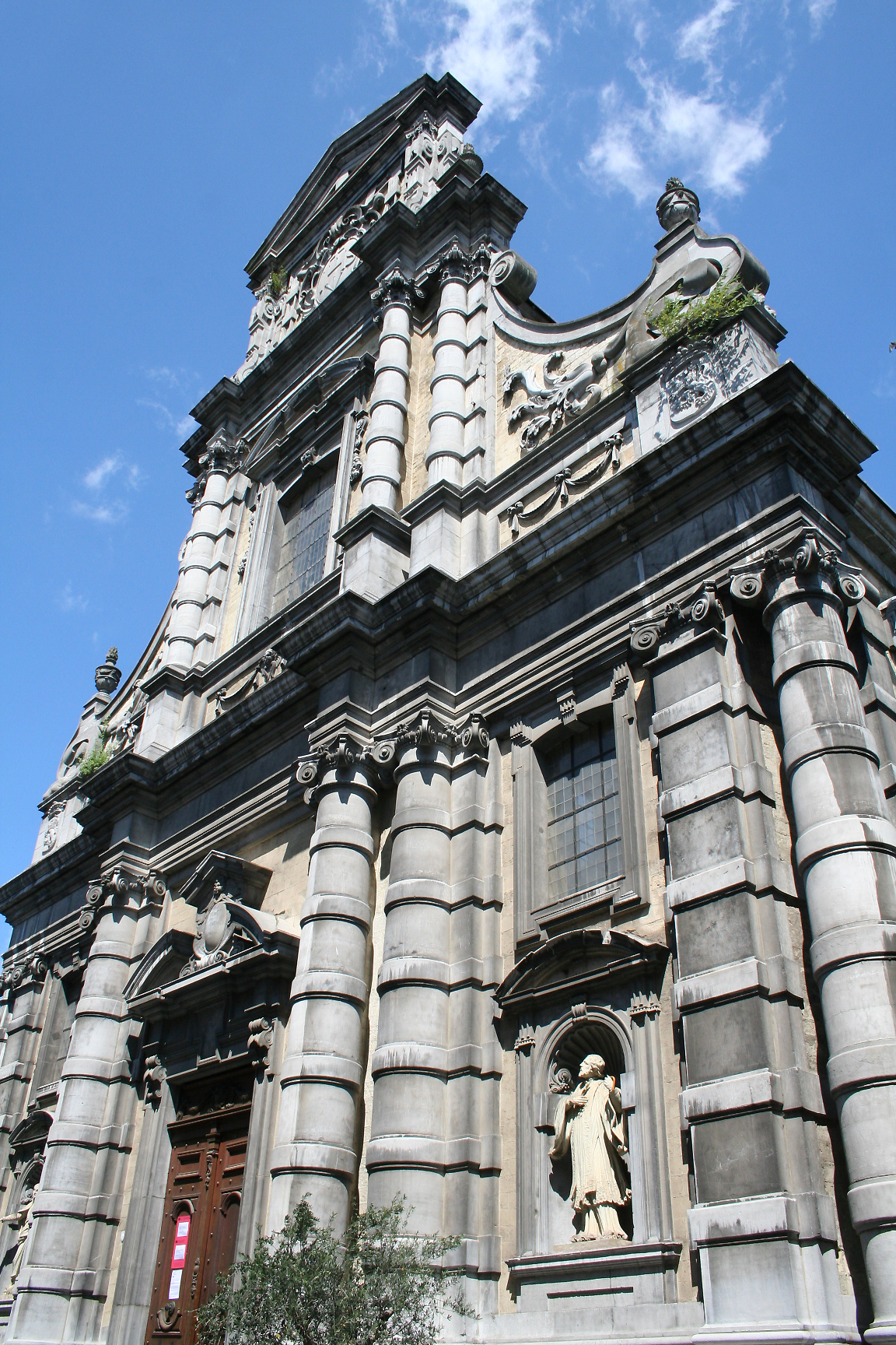 Namur, l'église Saint-Loup (autrefois dédiée à Saint-Ignace) - (1621-1645).